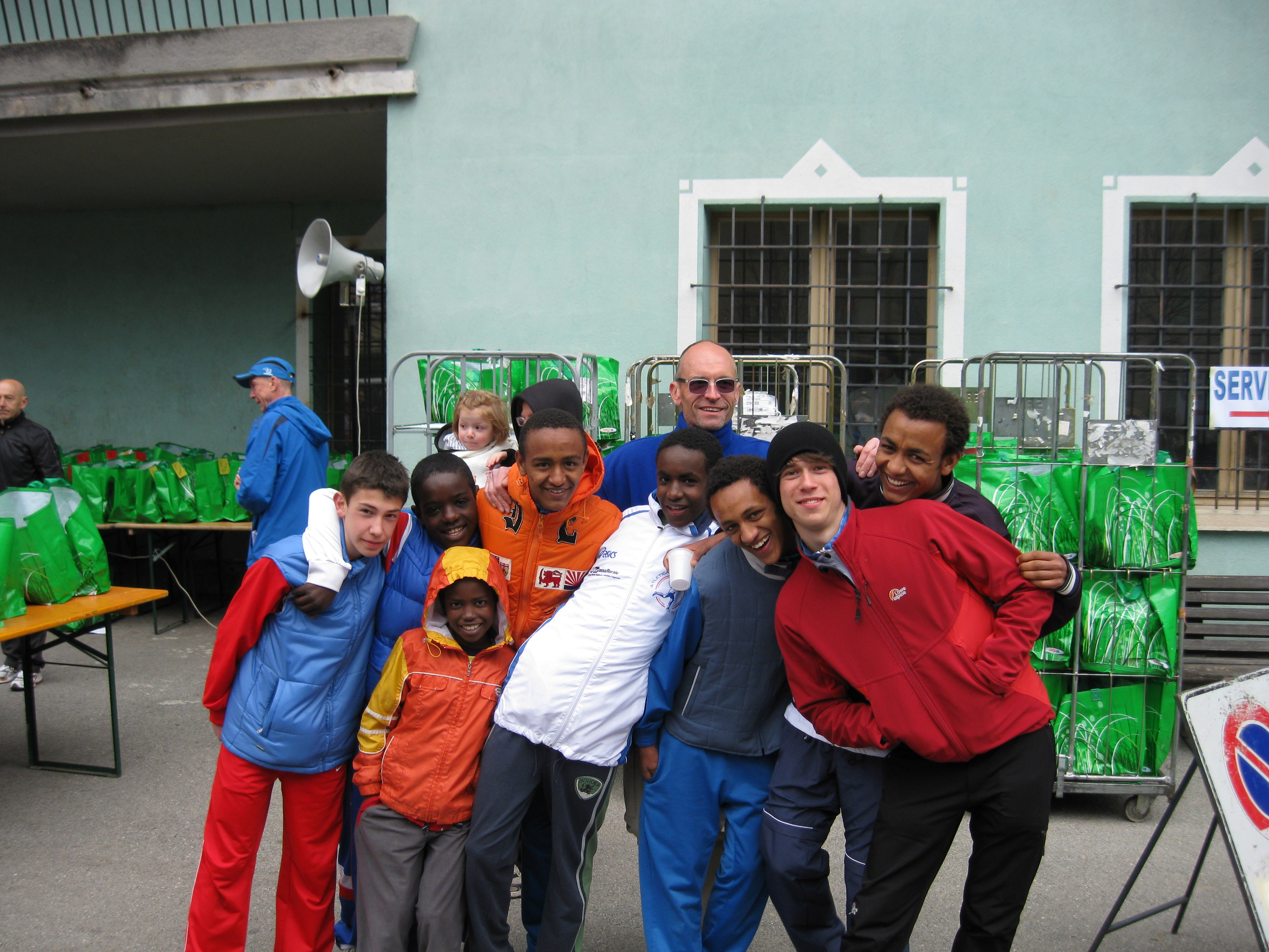 Yemaneberhan Crippa, terzo da sinistra in seconda fila con la tuta arancione, con il tecnico Marco Borsari e i compagni d'allenamento (2010)